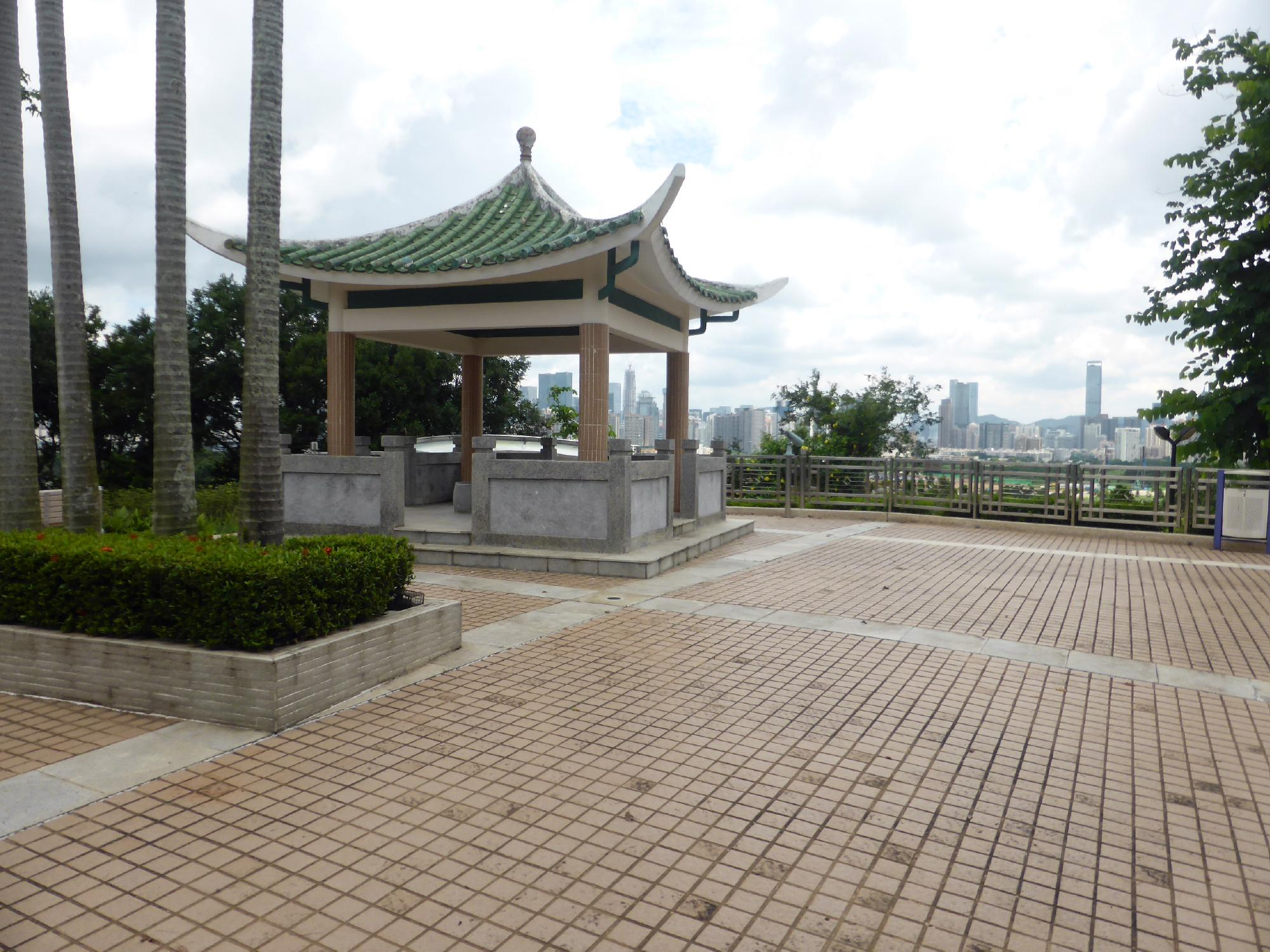 東屋と深圳